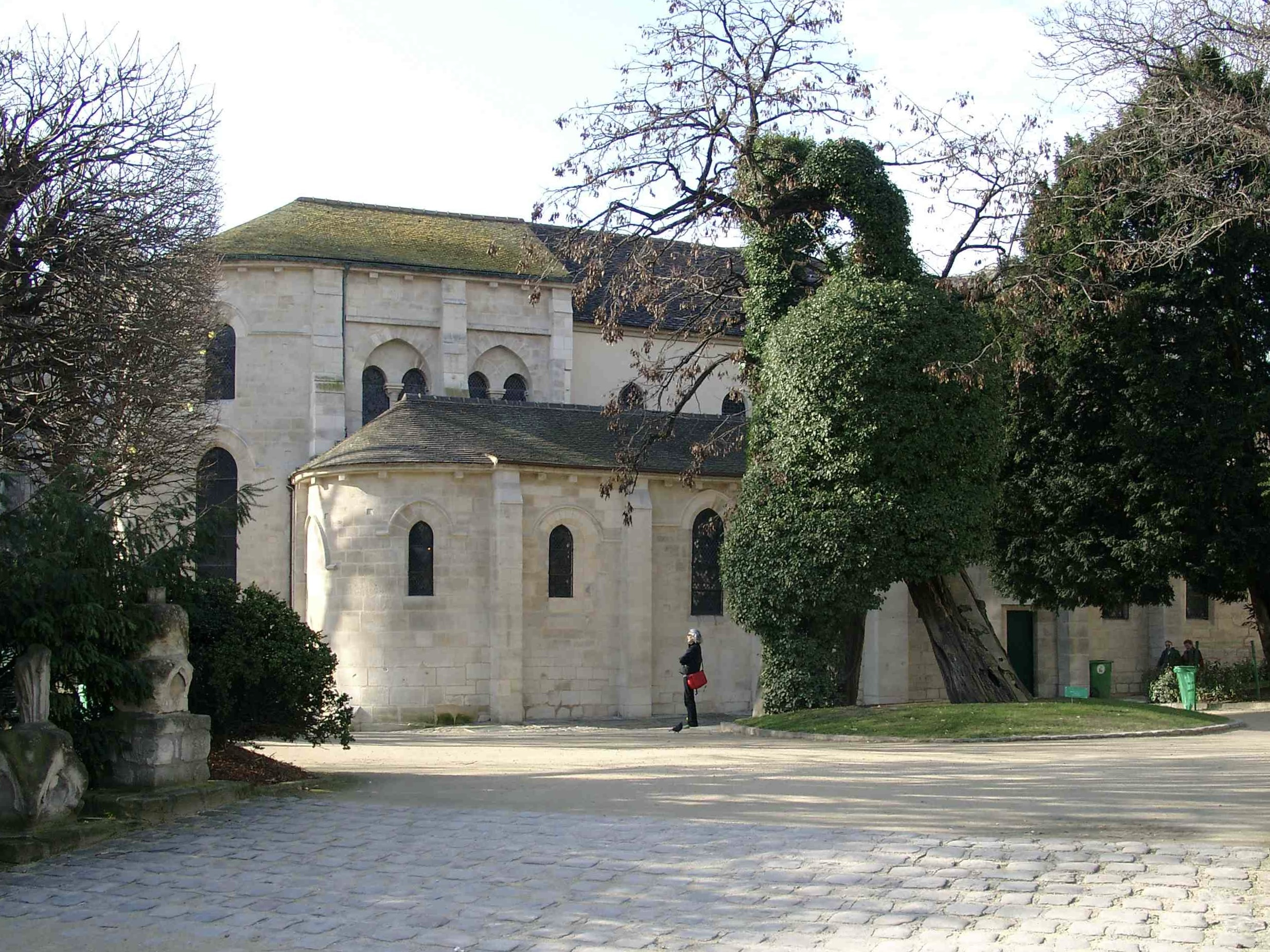 Paris, Church Saint-Julien-le-Pauvre